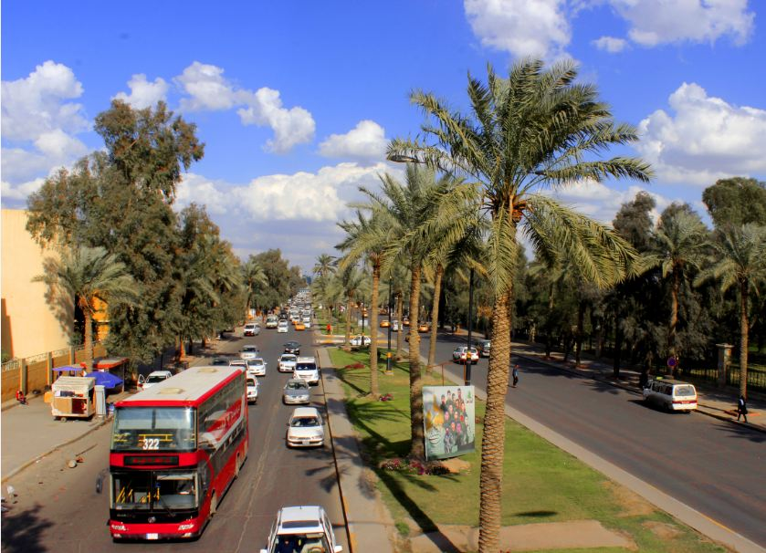 شارع الزوراء الشجرة التين والأغنام